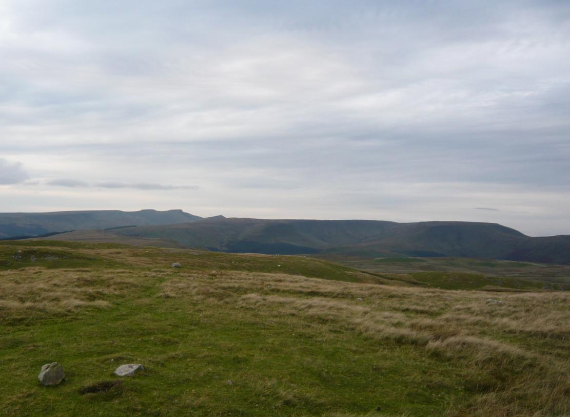 waun rydd